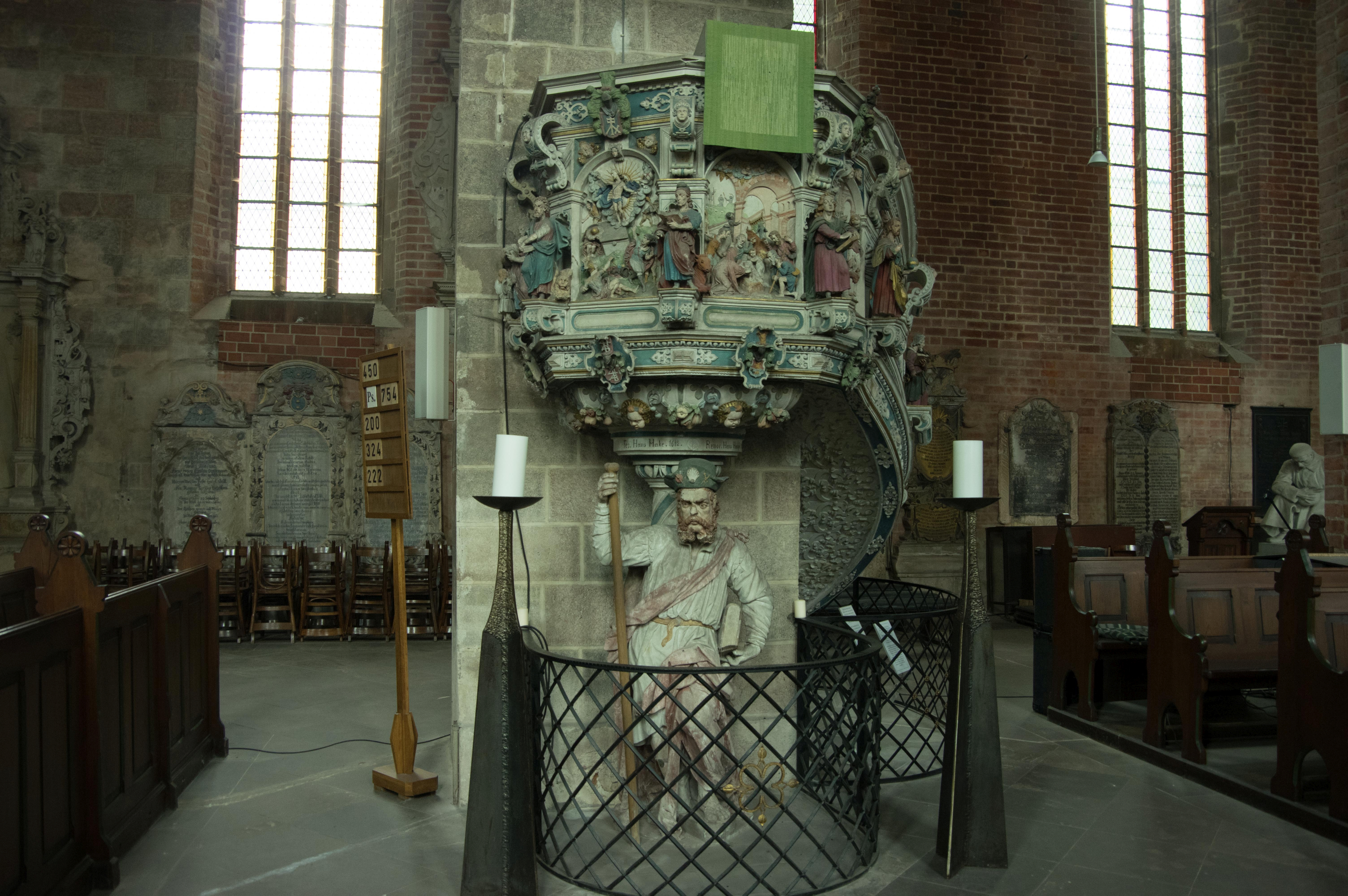 Stendal in Sachsen-Anhalt. Die Jacobikirche steht unter Denkmalschutz. Die Kanzel stammt von Hans Hacke